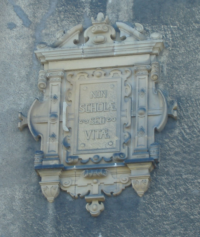 Schriftzug des HBG in Bremen